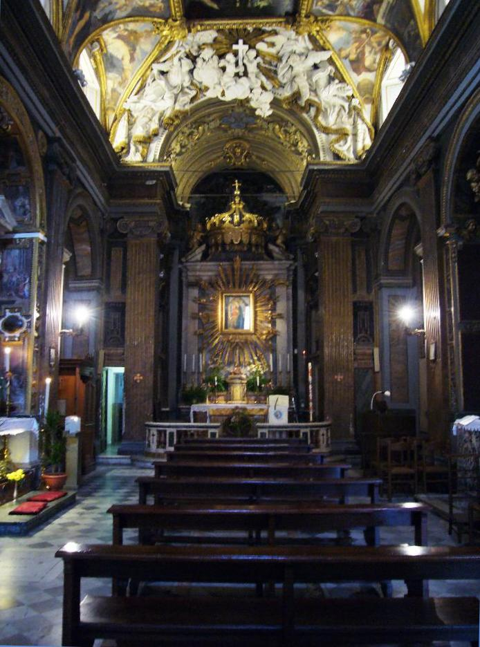 Roma, Santa Maria in Trivio, interno